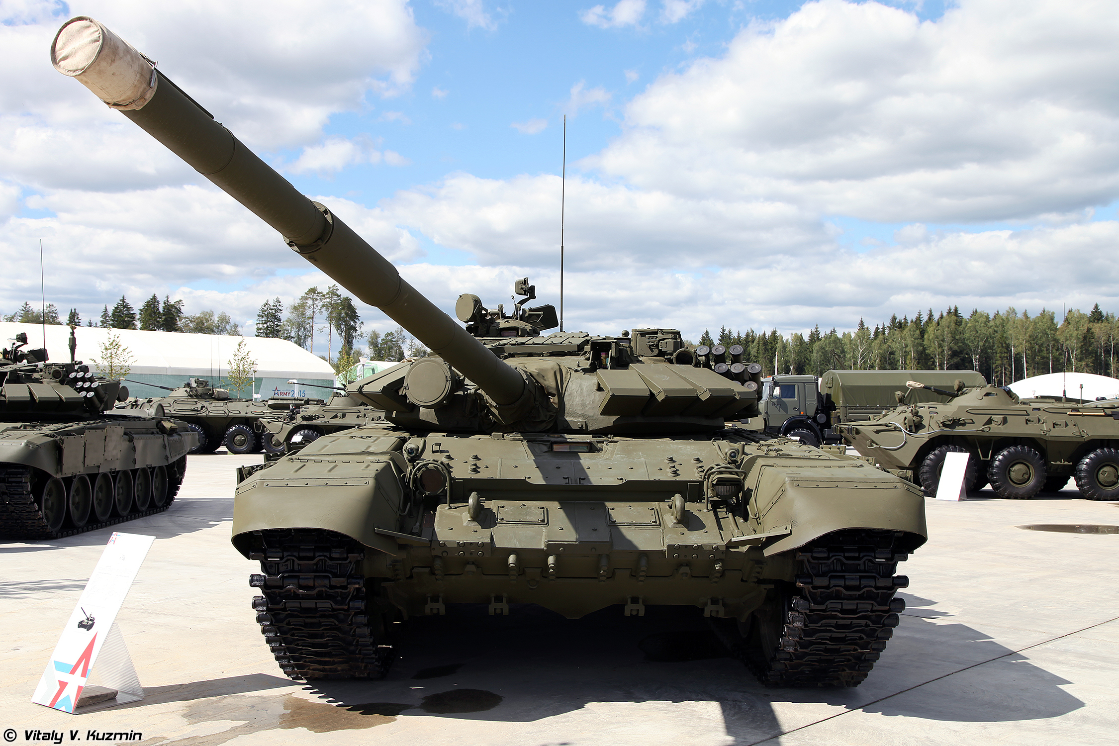 Т-72Б обр.1989 г. (T-72B model 1989)